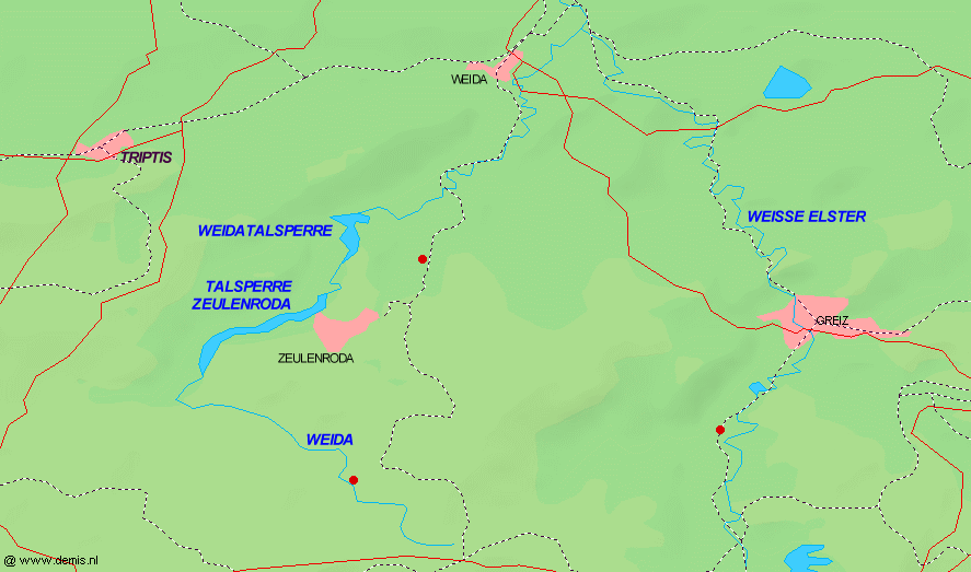 Lage der Talsperren an der Weida in Ostthüringen